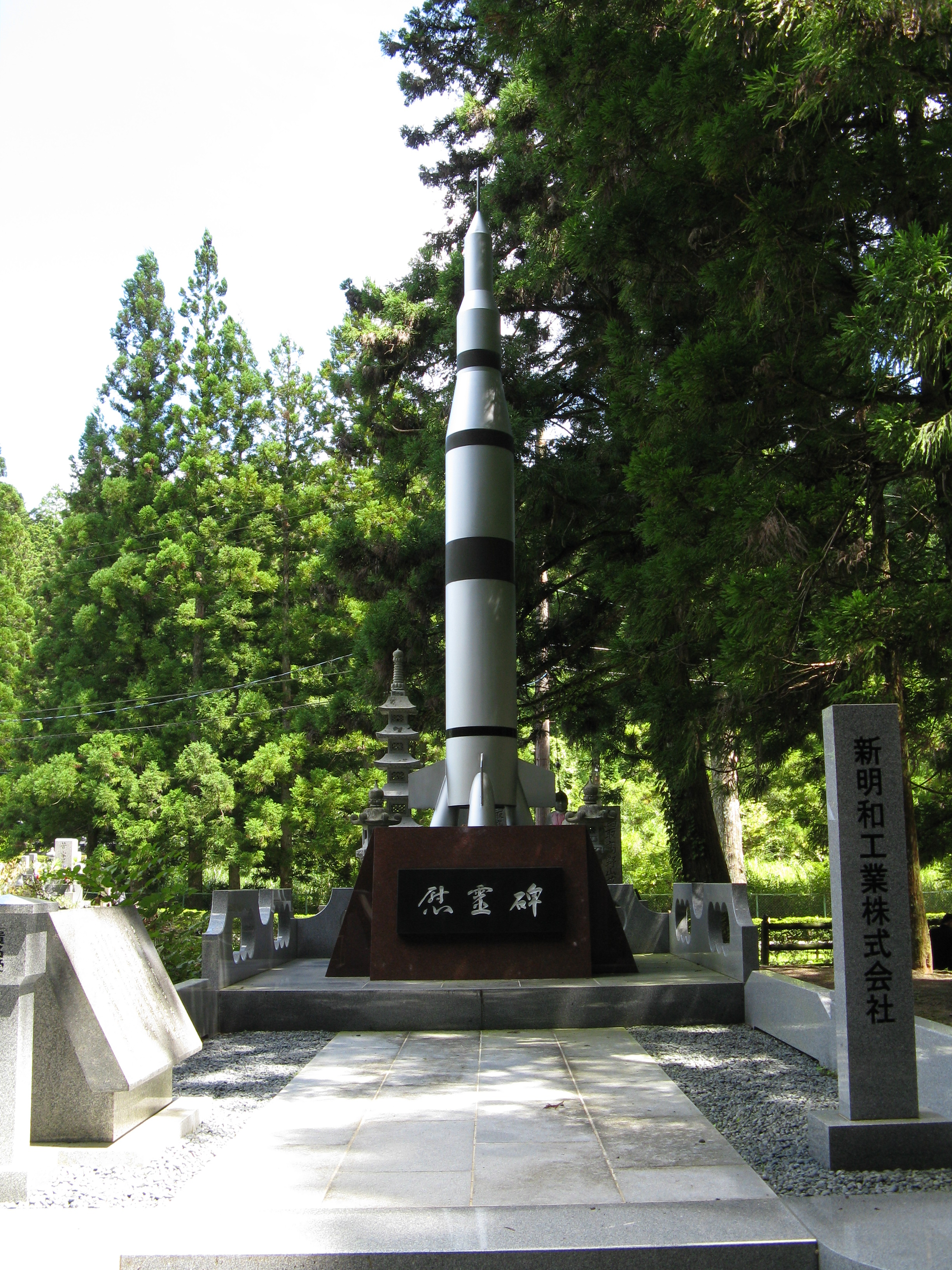 高野山 奥の院 新明和工業慰霊碑